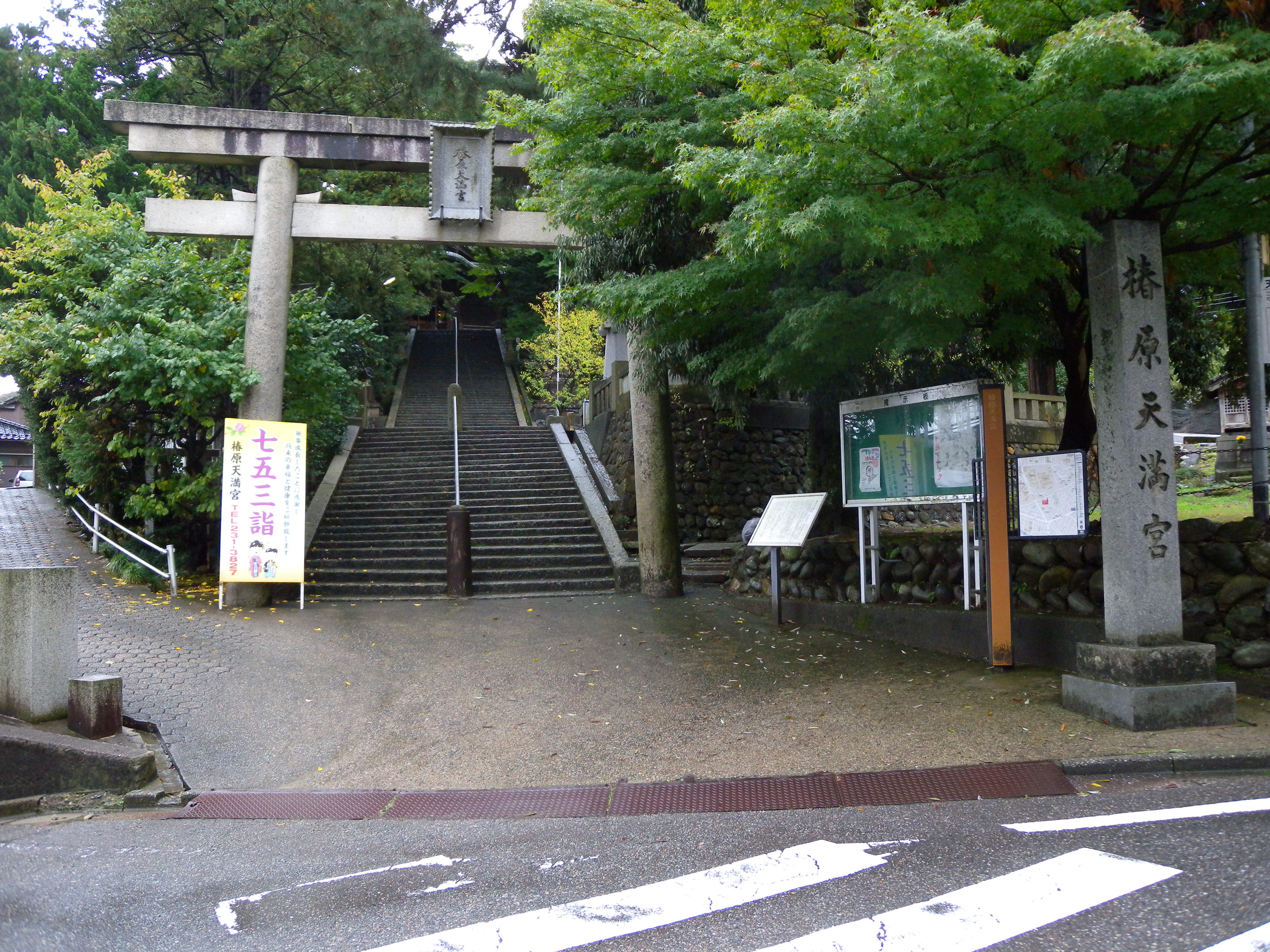 椿原天満宮（洲崎慶覚が屯主を務めた椿原砦に建つ）